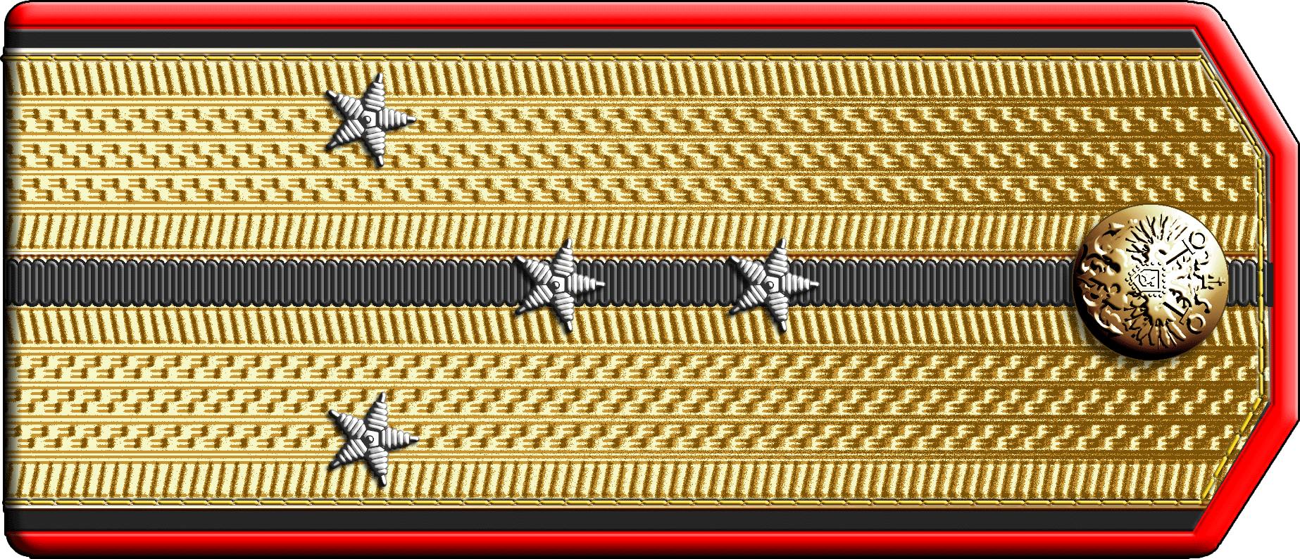 Российская империя; Российский Императорский флот. Офицеры 'Корпуса морской артиллерии, продолжавшие службу после упразднения Корпуса на действительной службе, призванные в военное время из запаса и служащие на судах Добровольного флота. Знаки различия по состоянию на 1904-1917г. Погон классного чина Штабс-капитан Корпуса морской артиллерии. Офицеры Корпуса инженер-механиков флота. Знаки различия по состоянию 1913-1917г. Погон классного чина Инженер-механик Штабс-капитана. Первичный источник исходного изображения: Полное собрание законов Российской Империи, собрание 3, от 18 марта 1913г. № 39003., Приказ по Морскому ведомству №95 от 28 марта 1913г.